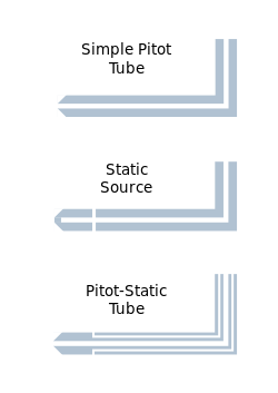 Các kiểu ống pitot